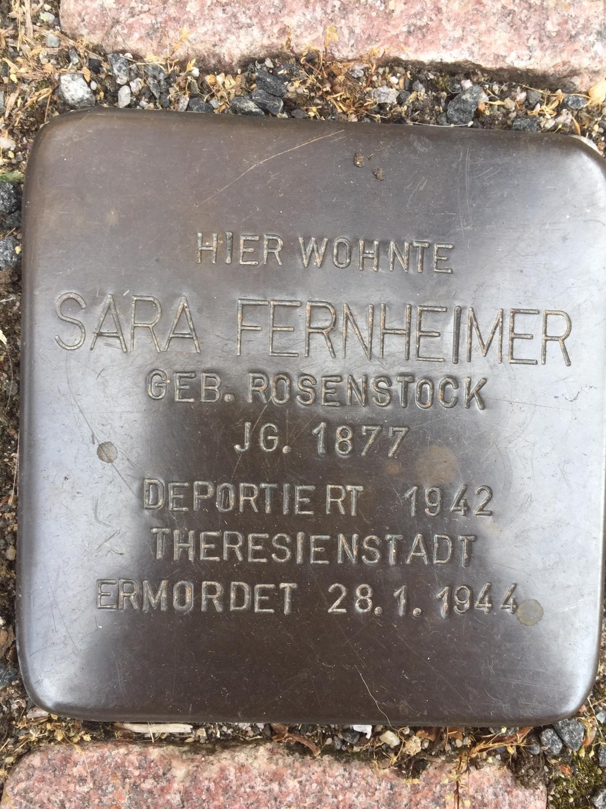 Stolperstein